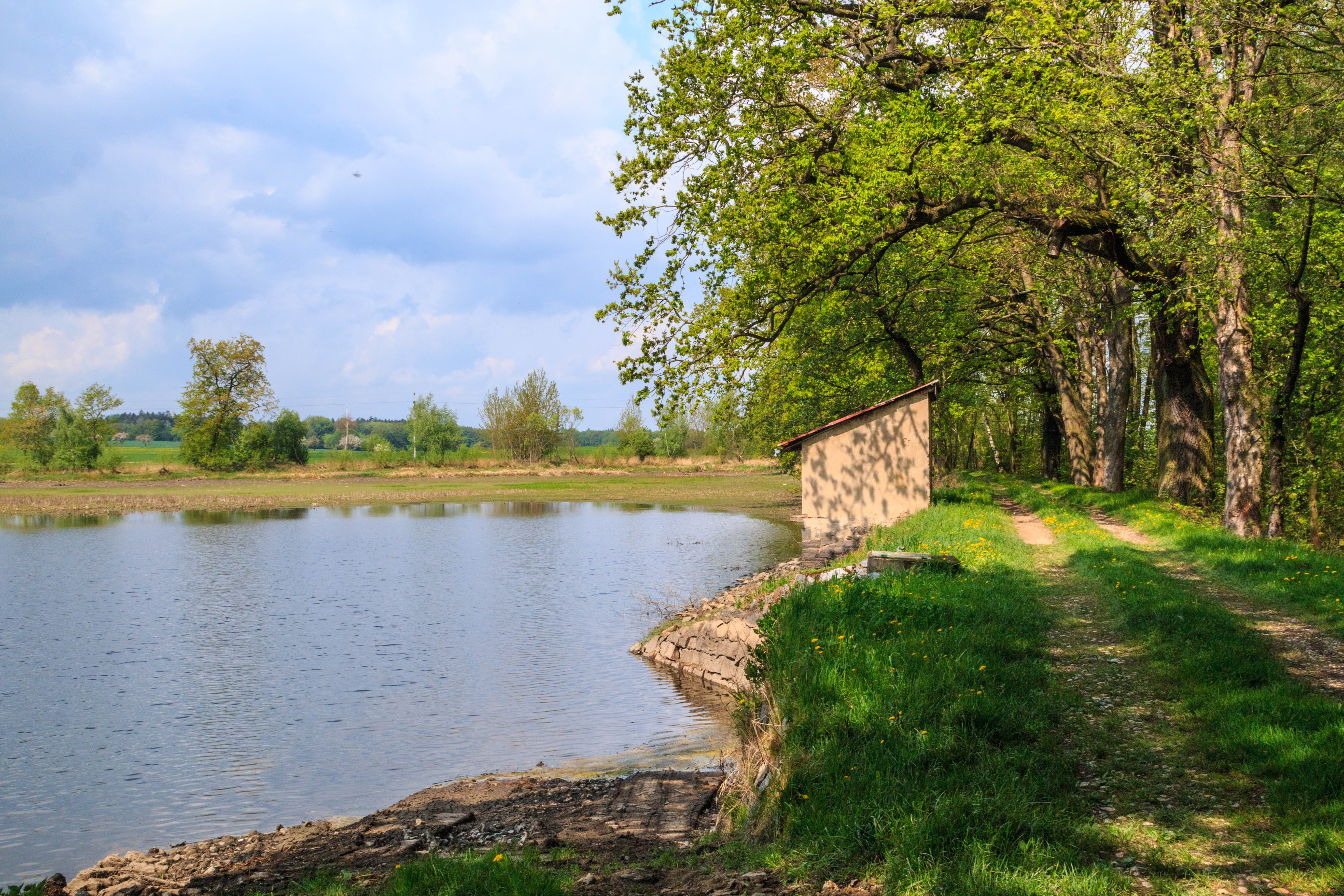 Urbanický rybník Project: Vodstvo.